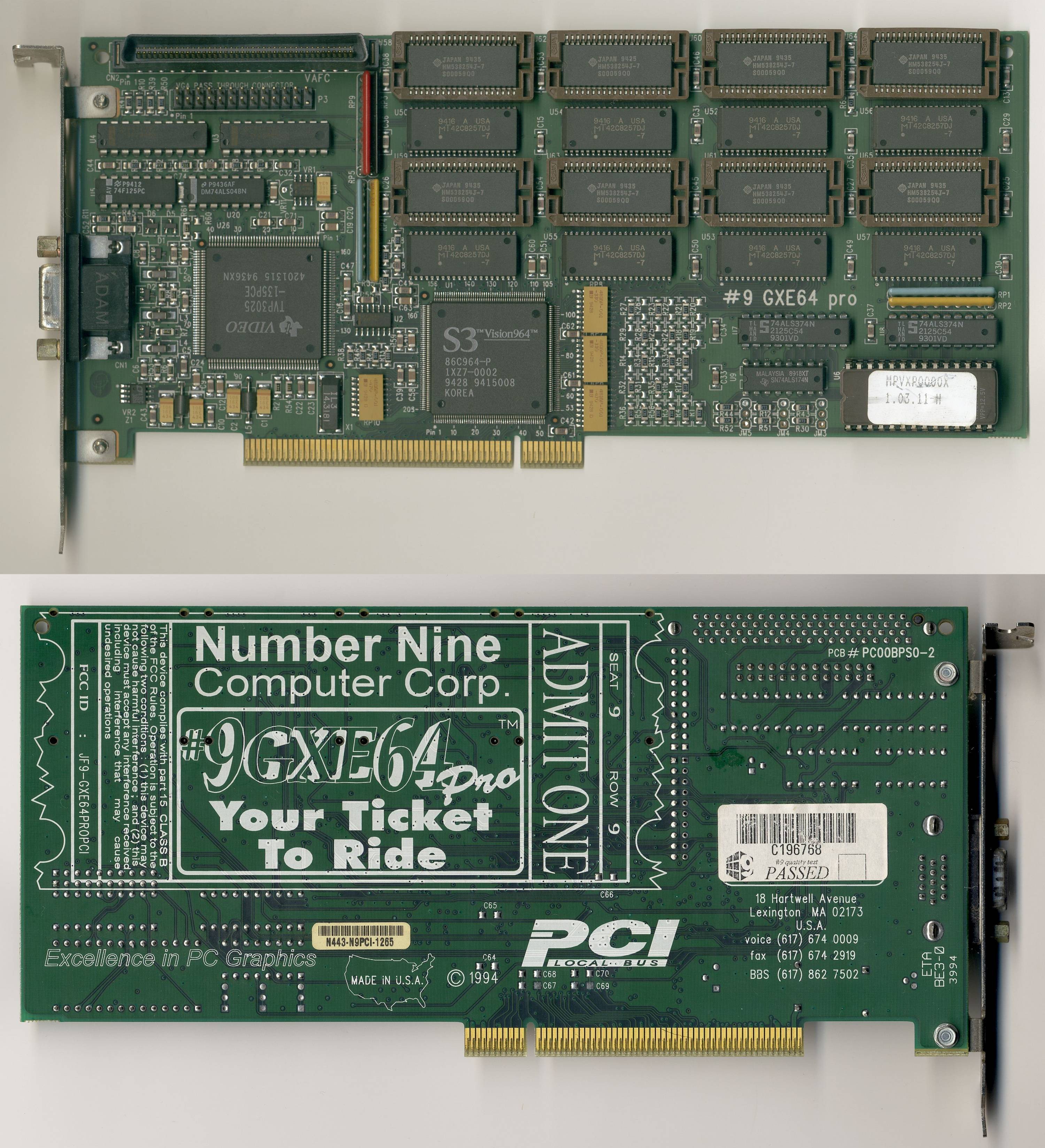 NumberNine GXE64Pro PCI (S3 Vision964)